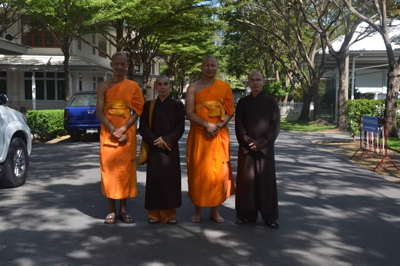 Hai nhà sư Việt nam sang Thái Lan dự lễ Kathina